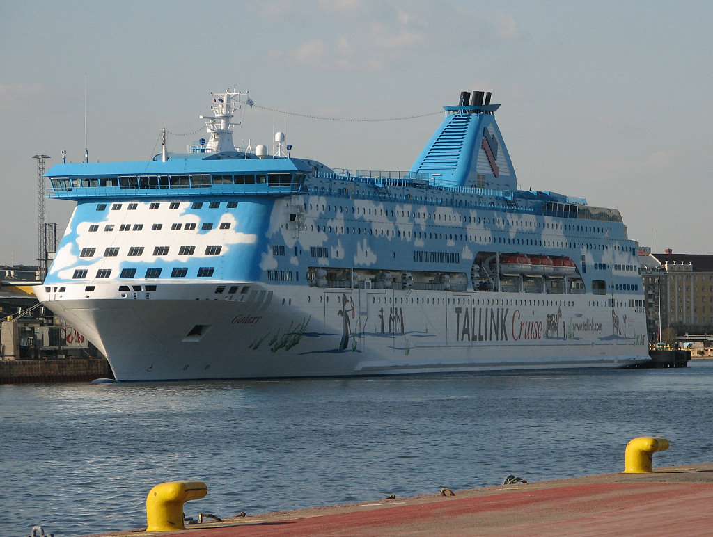 M/S Galaxy in Helsinki. Photo by Antti Havukainen.